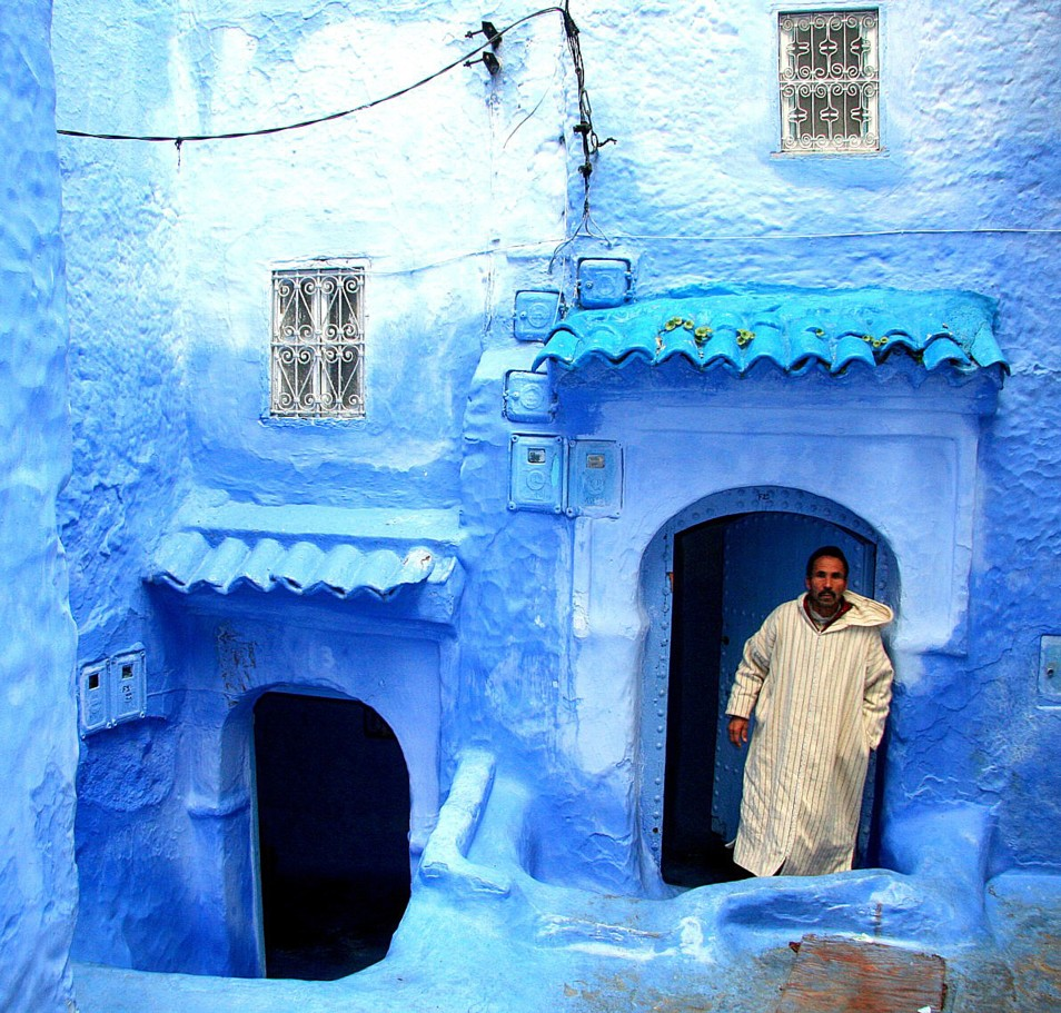 Casa de la medina de Chefchauen (Marruecos).